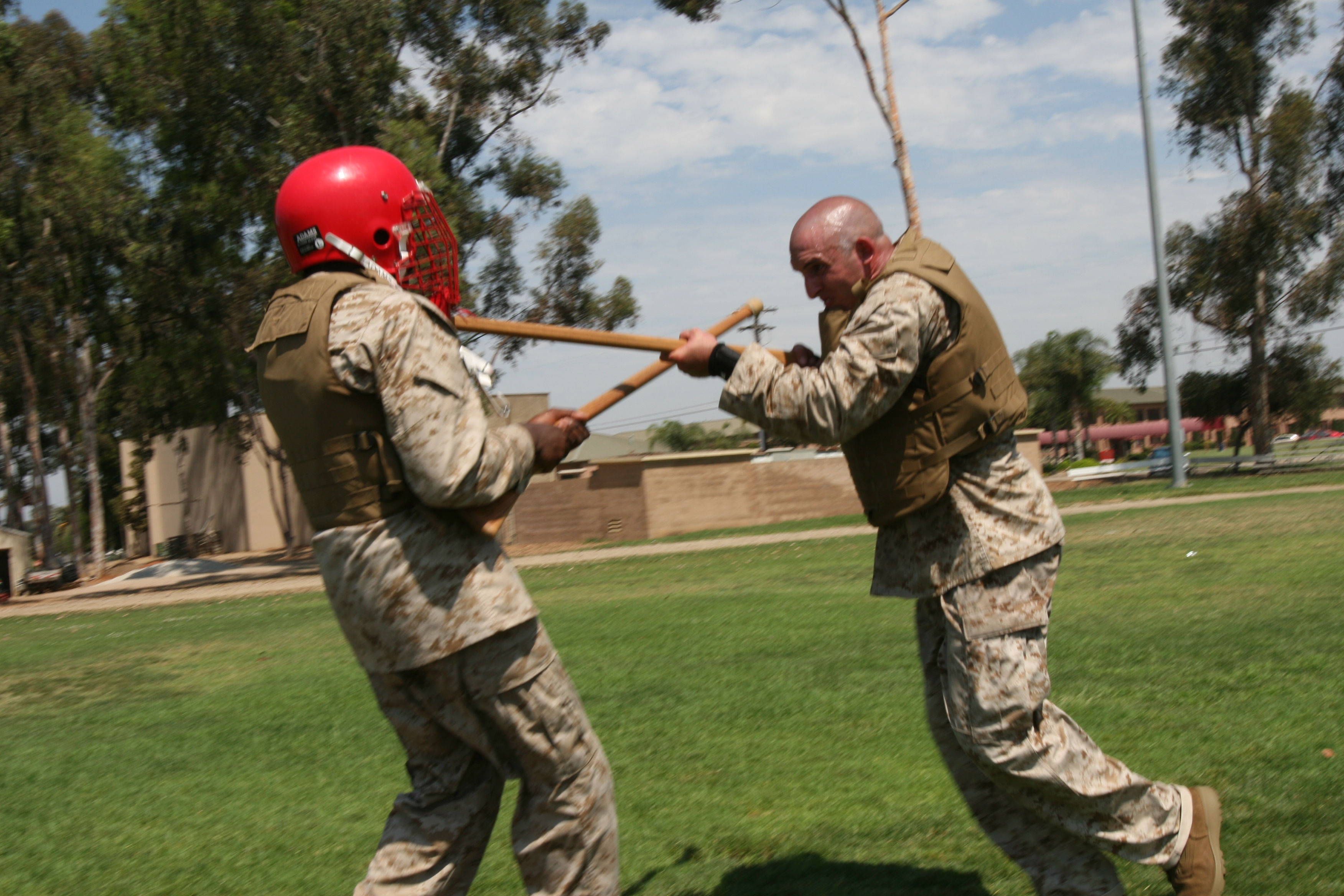 Marines practice bayonet techniques.